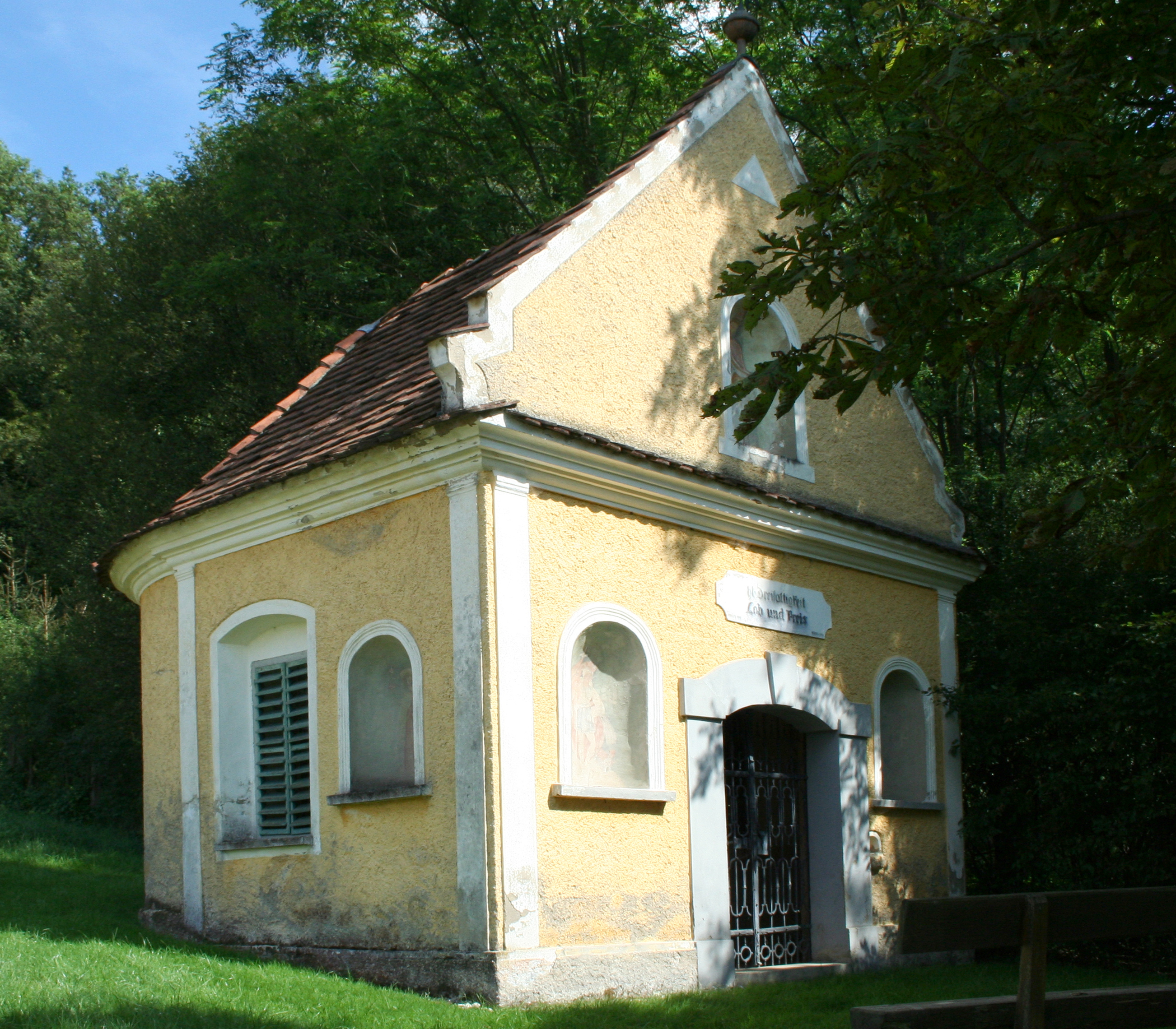 Dreifaltigkeits- bzw. Wiener-Kapelle